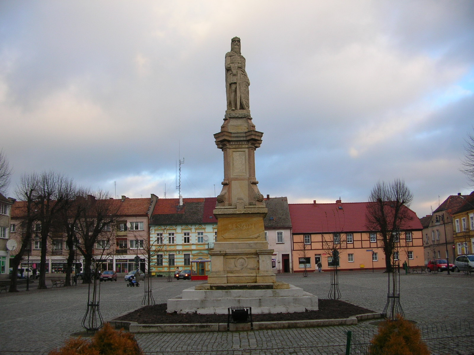 Mieszkowice - pomnik Mieszka I Autor : Bartek Wawraszko ( Bast )